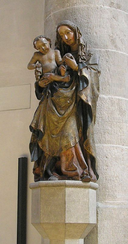 Dom zu Eichstätt (Oberbayern). Die gotische "Buchenhüller Madonna" (1430/40). Eigene Aufnahme, April 2007 / Eichstaett cathedral (Upper Bavaria, Germany). The gothic "Madonna of Buchenhuell" (1430/30). Own photo, April 2007